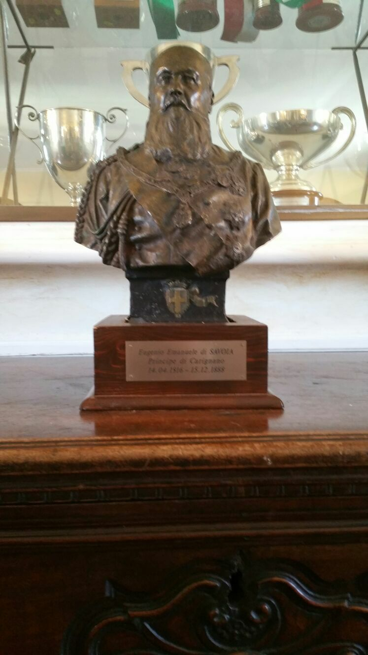 Eugenio di Savoia Carignano già Comandante Onorario di Piemonte Reale. Busto conservato presso il Circolo dei Verdi Lancieri, Roma